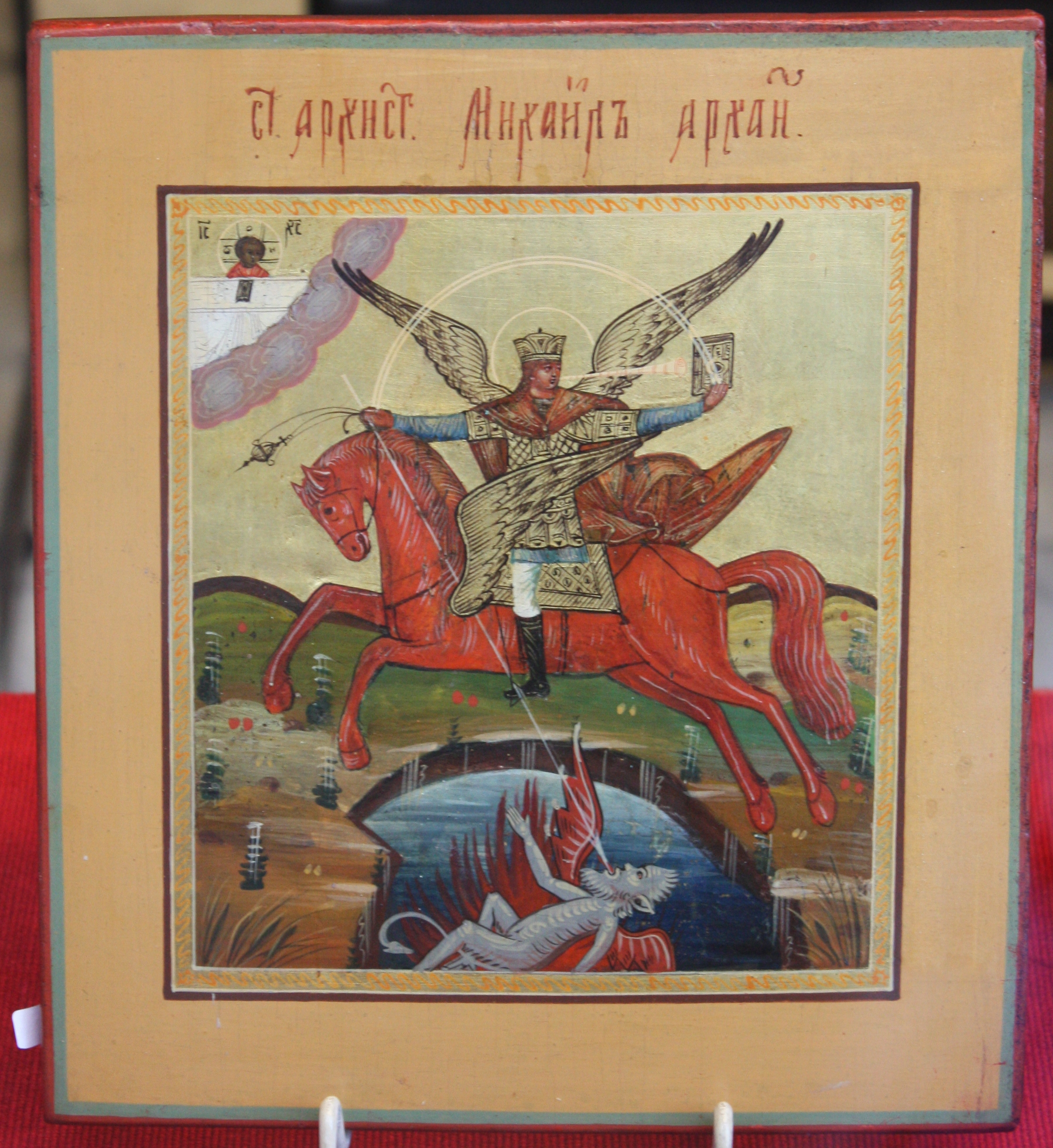 Icons (art) Vienna, Wien